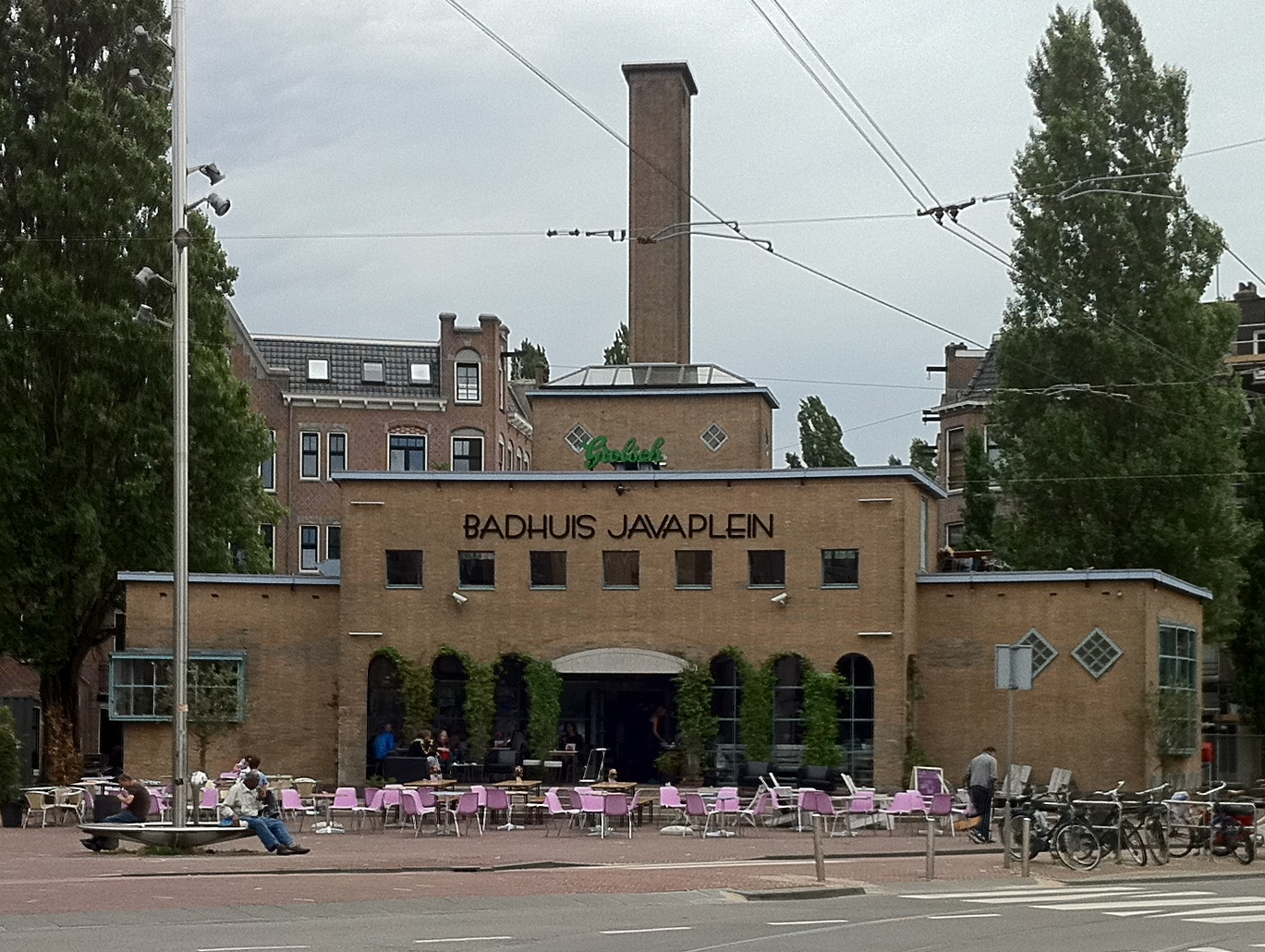 Tegenwoordig eigendom woningcorporatie Ymere